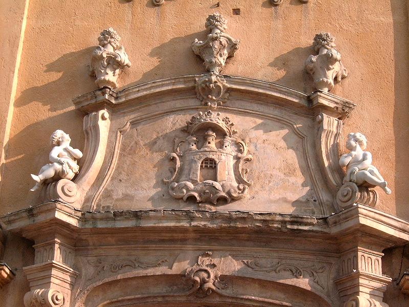 A székesfehérvári püspöki székesegyház bejáratának részlete, a város címerével Photo by Arpad Horvath